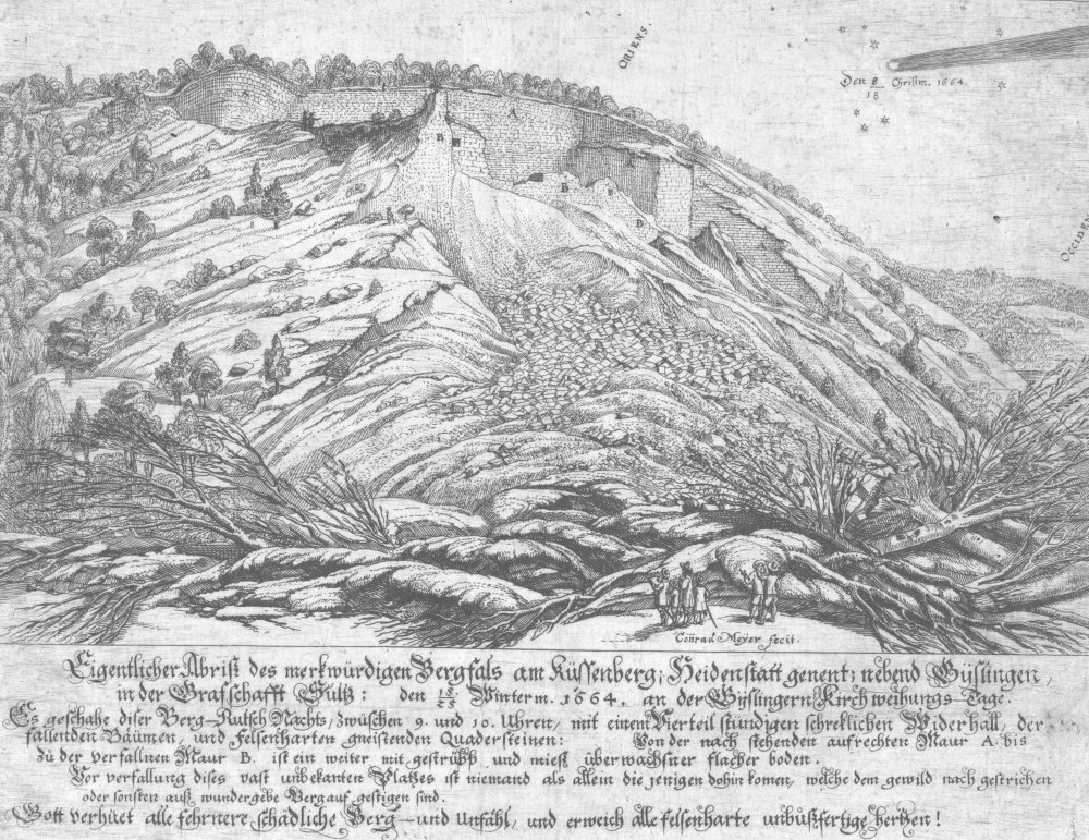 Kupferstich von Conrad Meyer 1665, Bergsturz vom 25. Dezember 1664